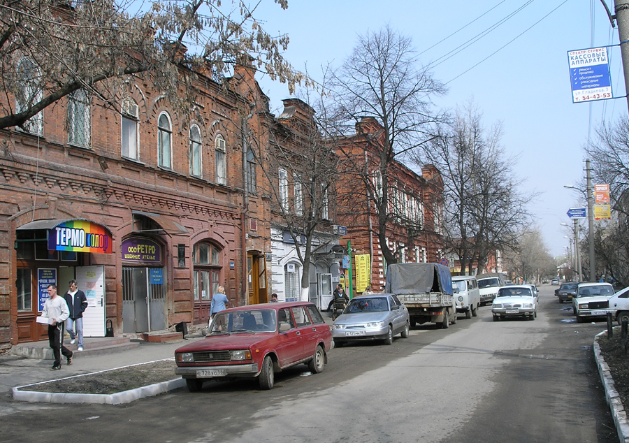 Пенза. Улица Гладкова